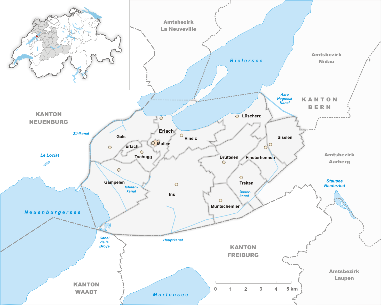 Municipality Mullen